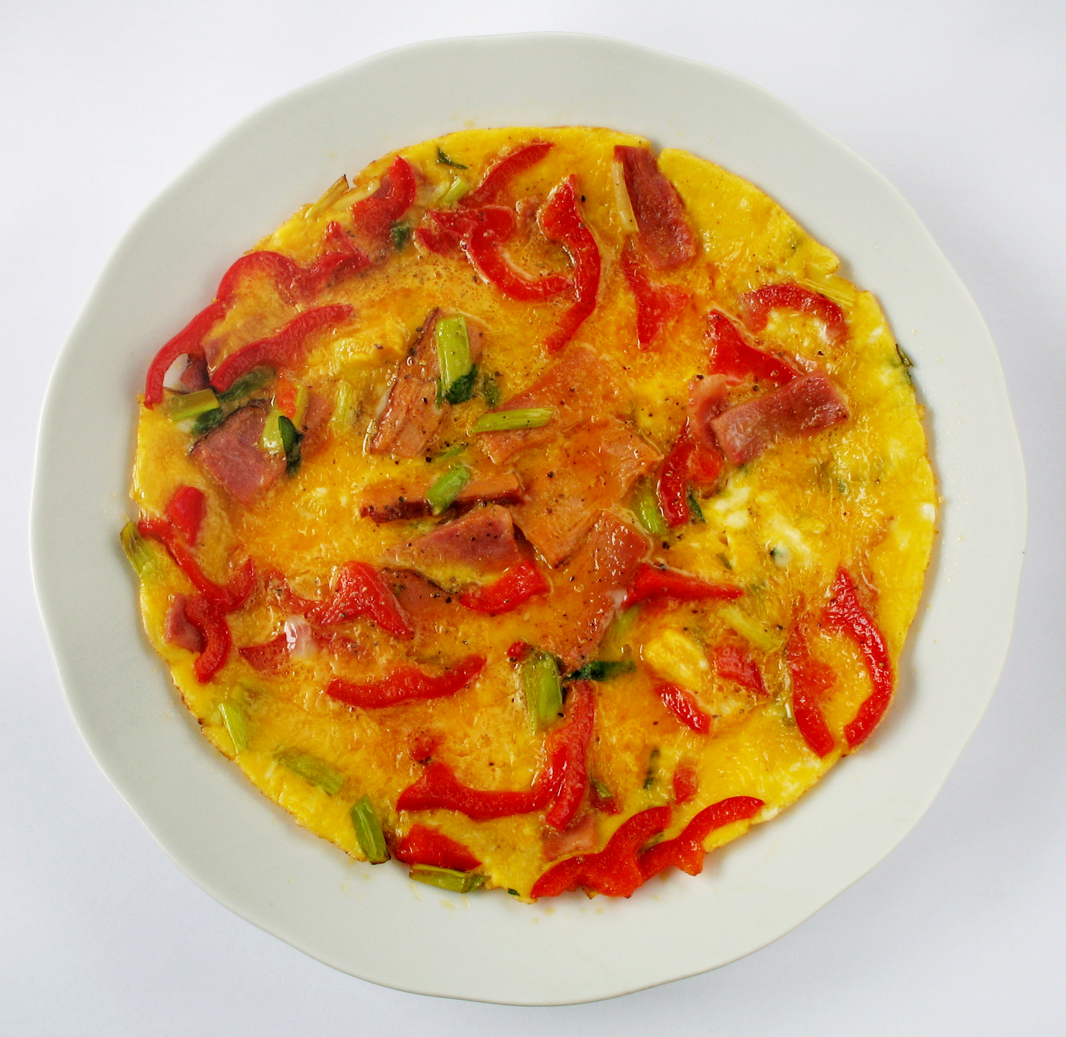 Omelett